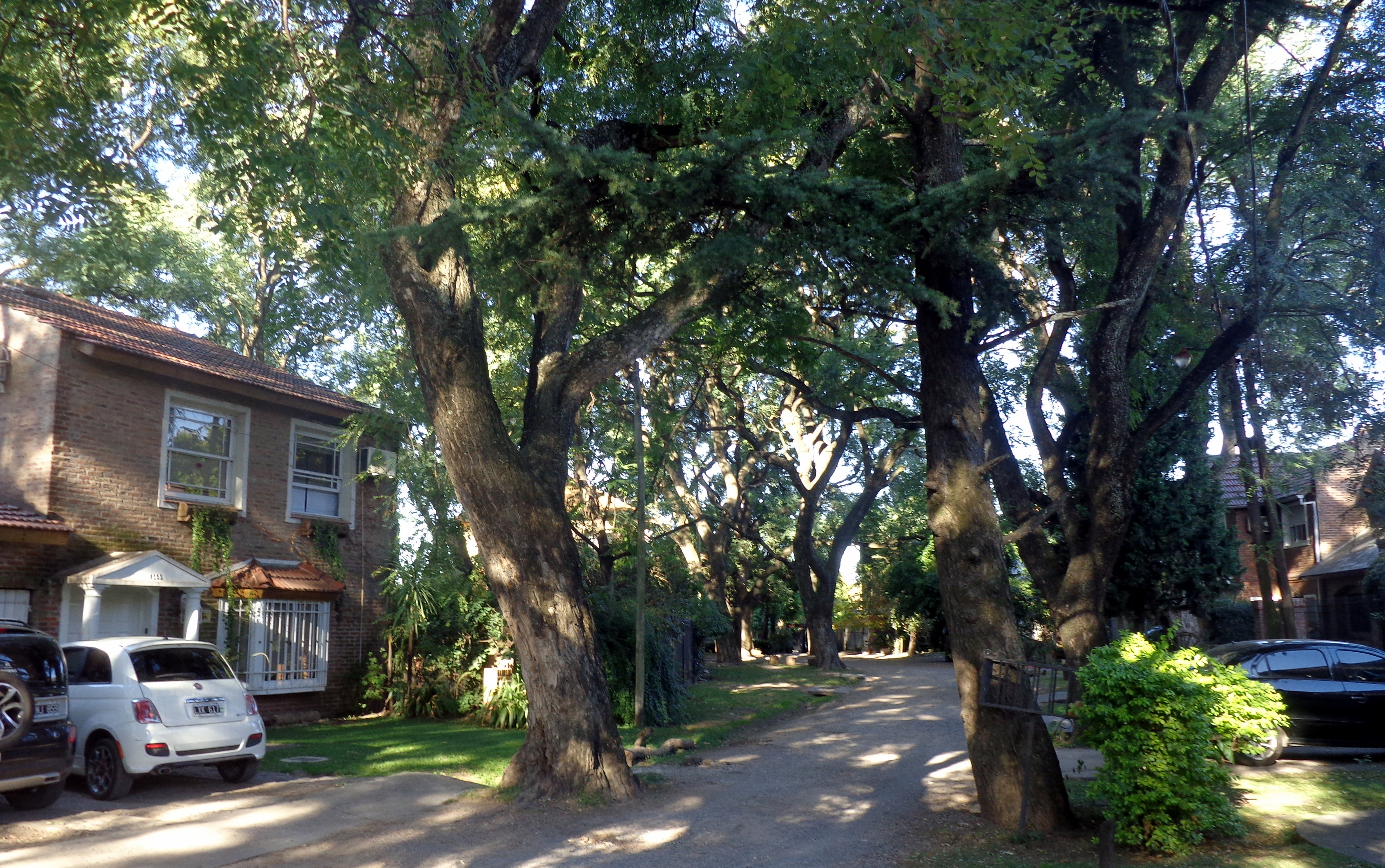 Fue inaugurada en 1944, en Lomas del Palomar, Provincia de Buenos Aires, Argentina. Ideada por el empresario alemán Erick Zeyen. Considerada primera en su tipo en Sudamérica, busca tanto los beneficios de lo urbano como de lo rural: posee espacios verdes destinados al ocio, disposición que ofrece equipamiento cultural de todo tipo: escuelas, iglesias, clubs y parques están entremezclados y a distancia de paseo de todas las viviendas.